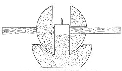 מתקן לריסוק זיתים